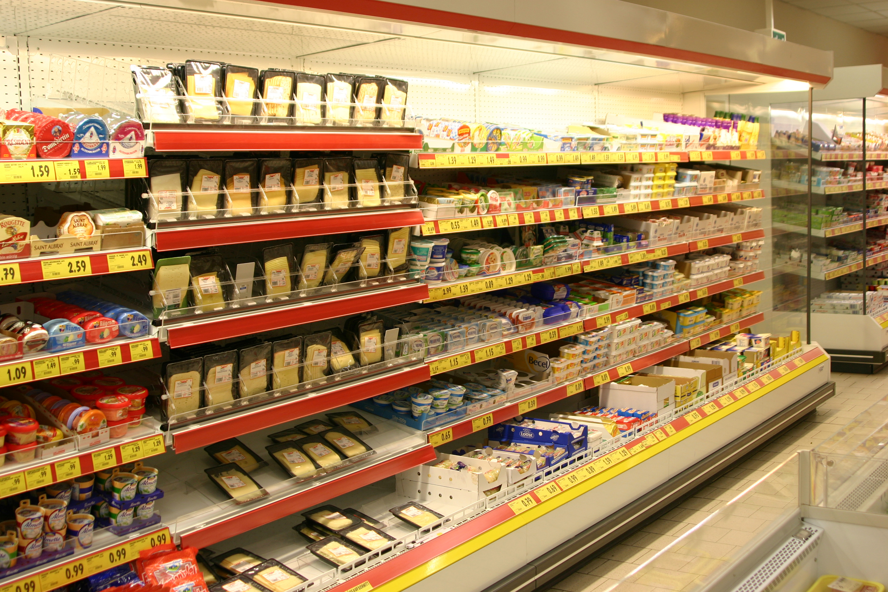 Bilder im Supermarkt REWE